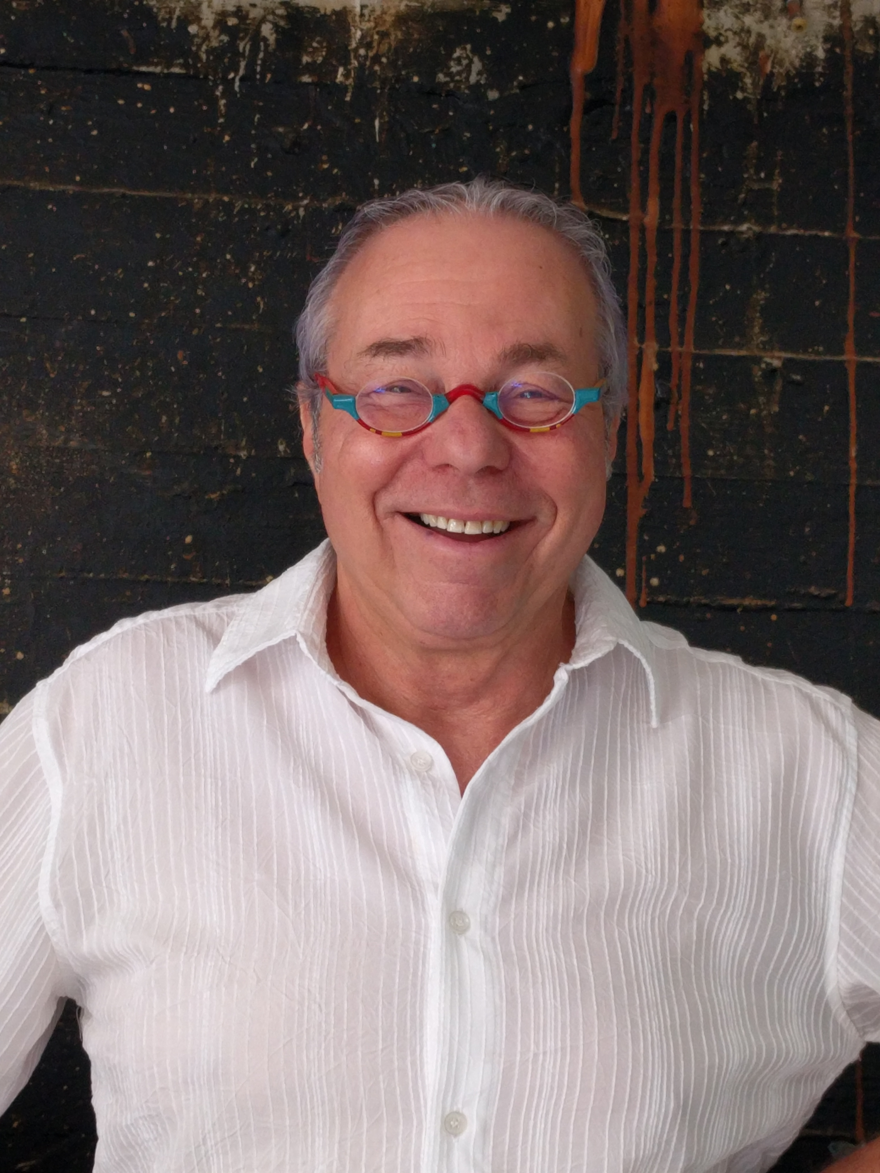 אבנר שר